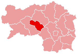 Karte: politischer Bezirk Knittelfeld Lizenz: GNU FDL Quelle: Zeichnung plp Datum: de:2004 Ort: Wien